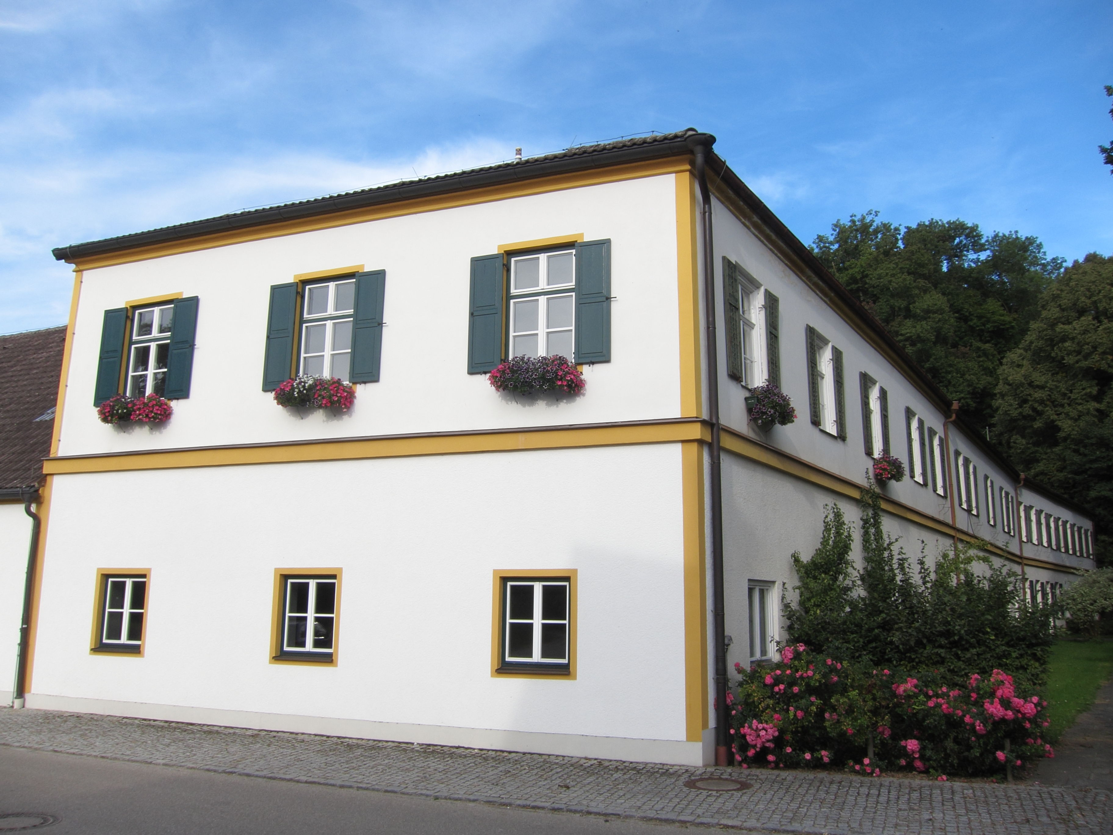 Ehem. Hofmarksschloss, ein und zweigeschossiger Vierflügelbau mit Walmdach im Stil des Biedermeier, 1794 und 1847; Seitenflügel.